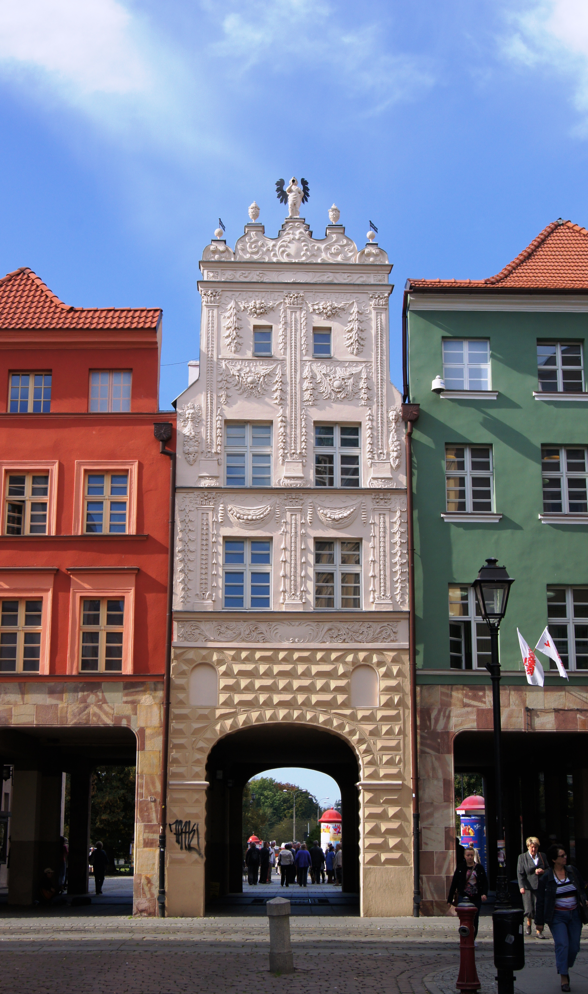 Toruń, ul. Piekary - kamienice, od lewej: - ul. Piekary 35 (fragment) - ul. Piekary 37, kamienica, tzw. Łuk Cezara (zabytek nr A/77) - ul. Piekary 39 (fragment)